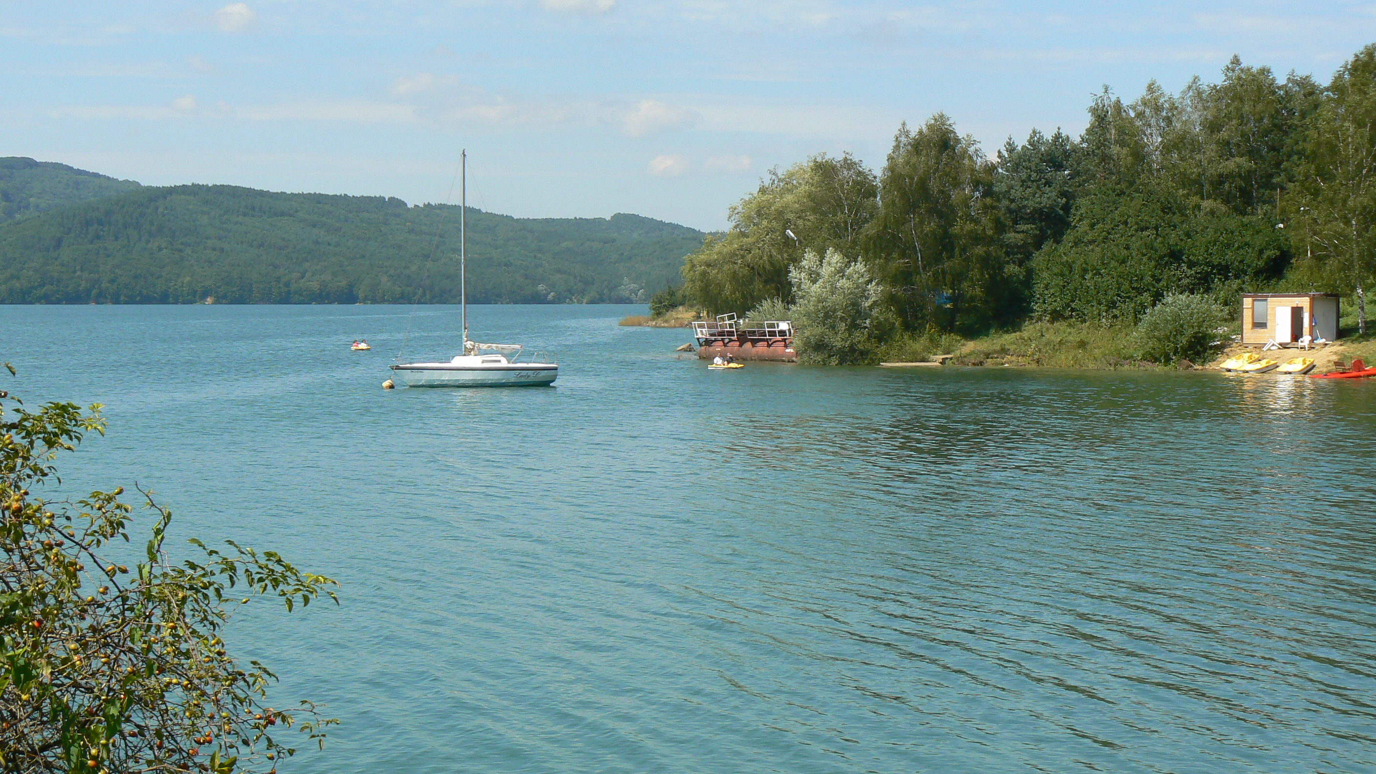 Vodné dielo Veľká Domaša.